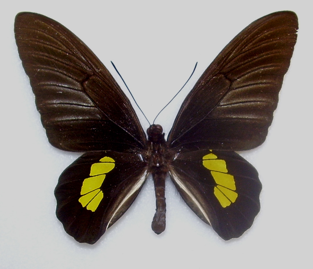 Troides haliphron Male, upperside.